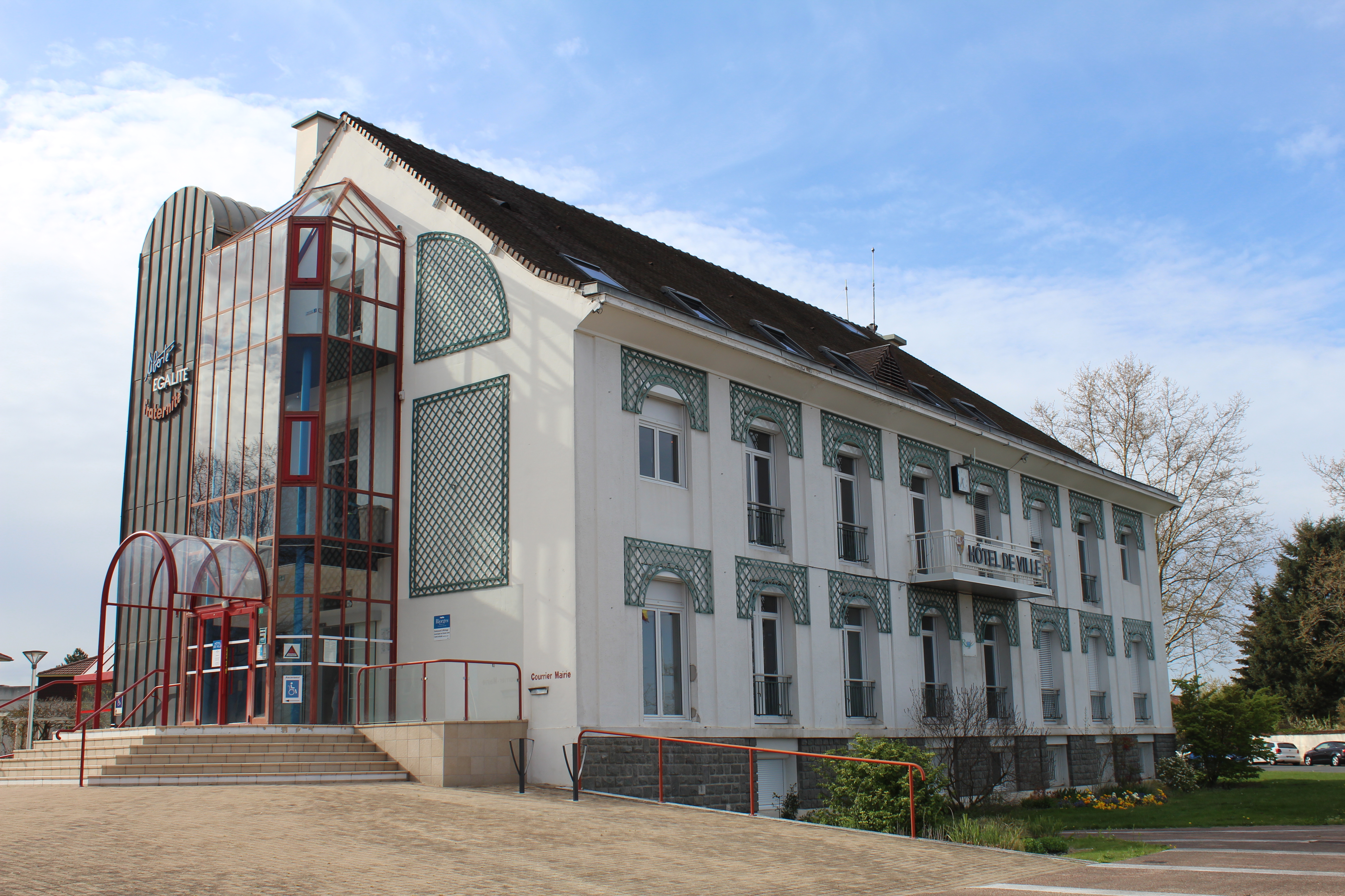 Hôtel de ville de Riorges.